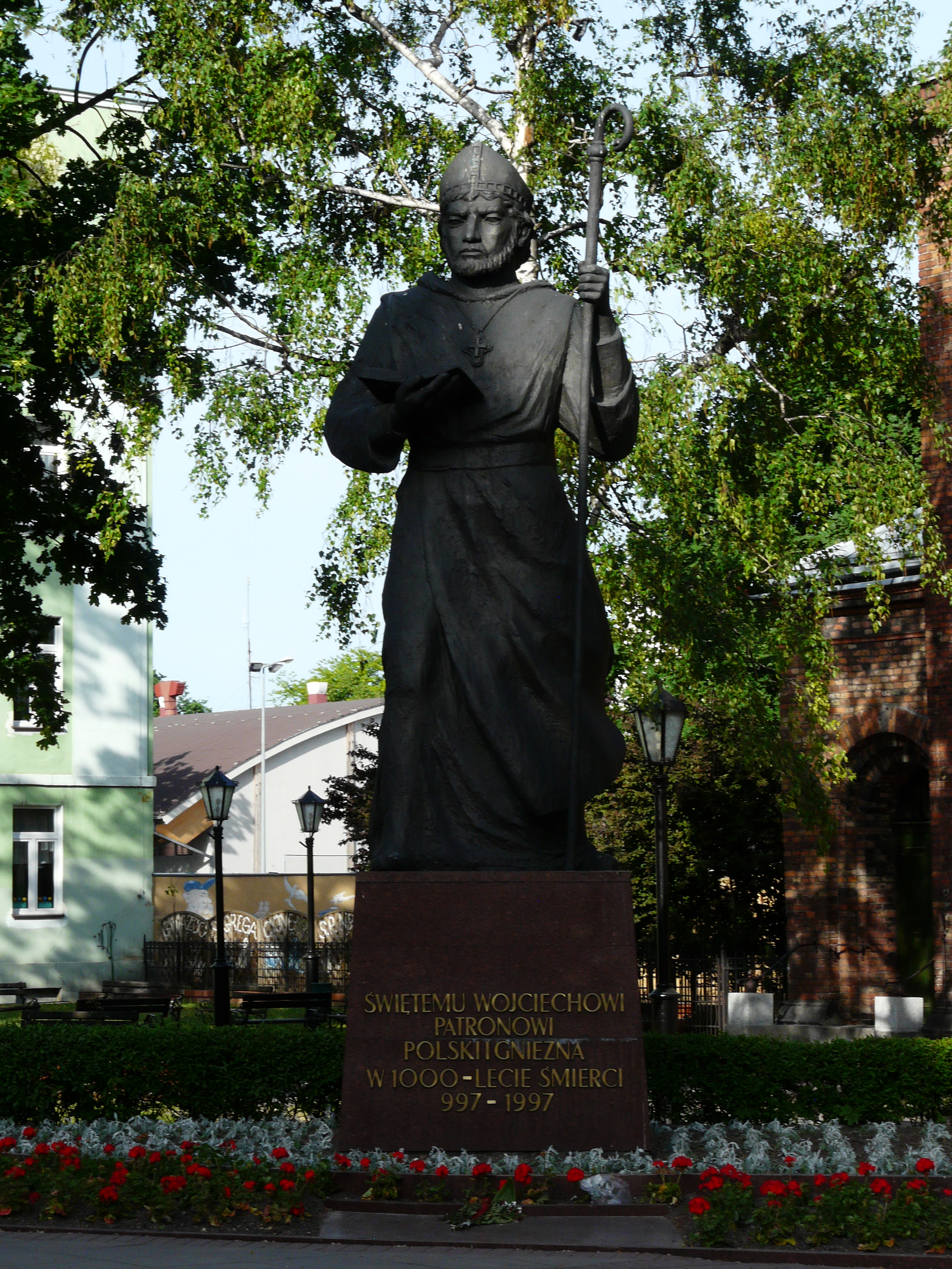 Gniezno, Poland